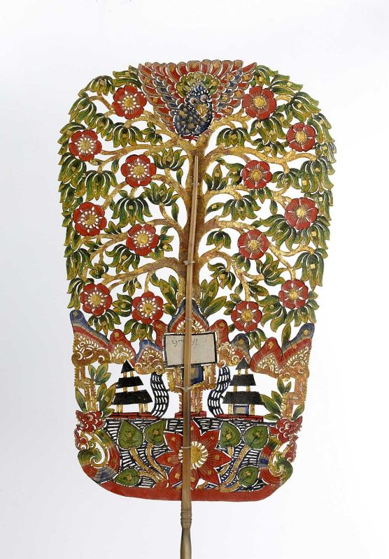 Schaduwfiguur. De Gunungan (berg) of Kayon (levensboom) staat bij aanvang van een wajangvoorstelling op het toneel. Daar staat het ook om het begin en het einde van een episode aan te geven, om de pauzes te markeren en als verbeelding van het bos, het gebergte of een paleis. Deze Gunungan is echt een levensboom, vol met bloemen. Bovenin de boom zit een vogel, mogelijk Garuda. Onderaan de boom twee tempeltjes met hierboven mogelijk gestileerde bergen. Onderaan links en recht een naga, een slang. In het midden onderin de afbeelding van de lotus. . Wajangfiguur voorstellende de berg Gunungan Unknown language: Wayang kulit purwa